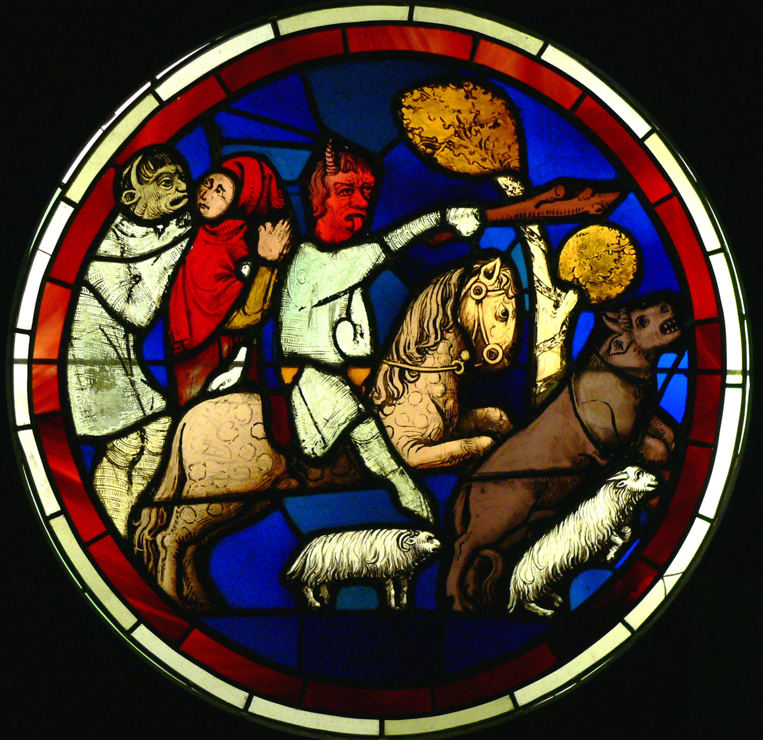 Le diable et une femme Avant 1248 Provenance: baie D (Judith et Job) Vitrail de la Sainte-Chapelle (Paris) Musée National du Moyen-Âge (Cluny), DS 1887 Source: Clio20